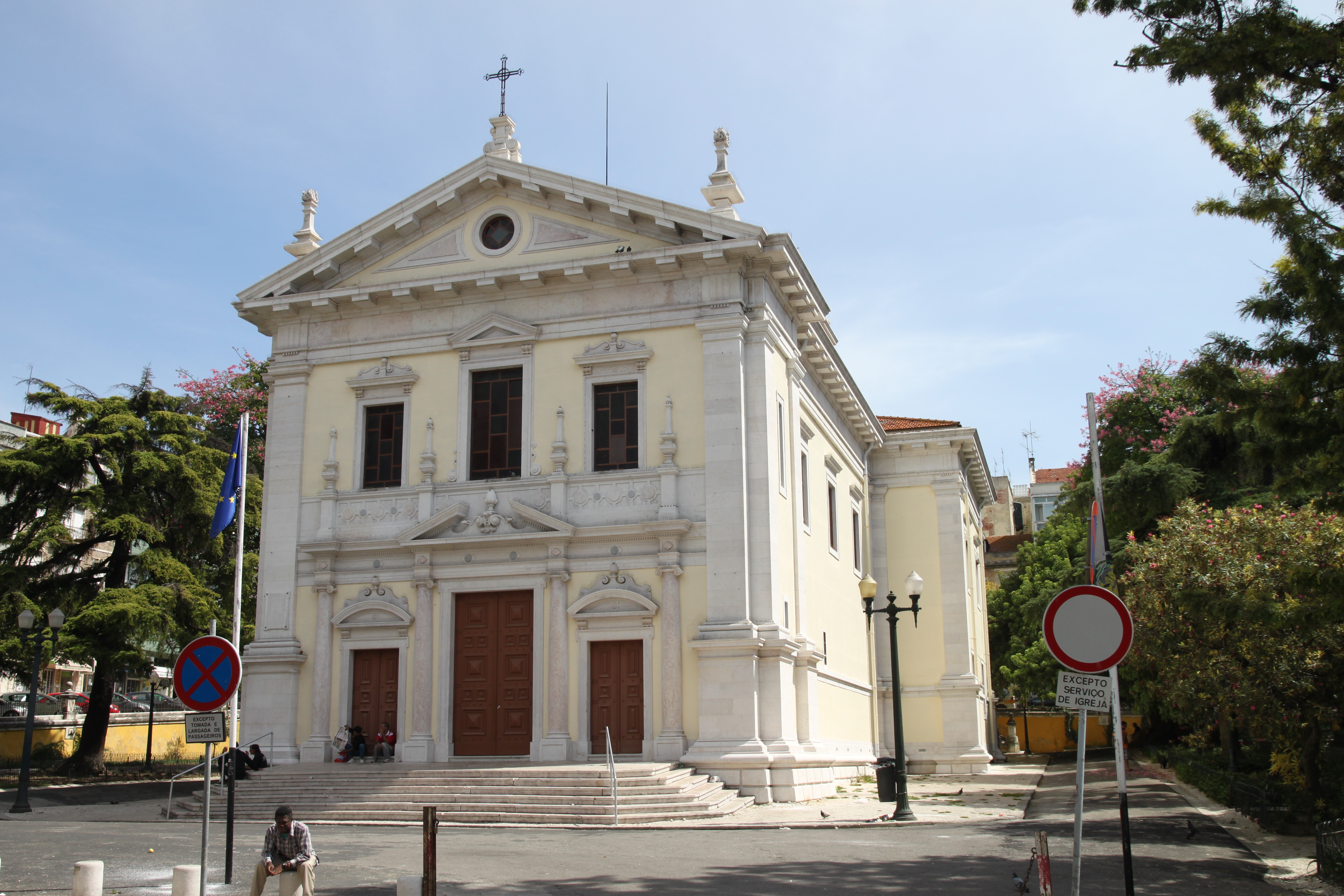 Igreja Paroquial de Nossa Senhora dos Anjos ou Igreja dos Anjos This monument is classified as Imóvel de Interesse Público.